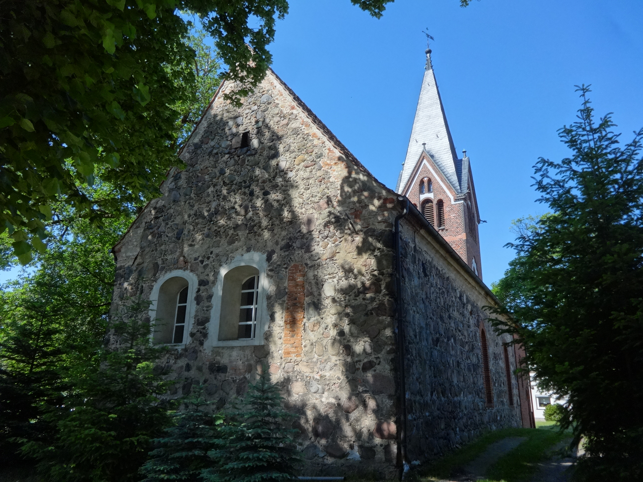 Die Dorfkirche Buckow entstand vermutlich in der ersten Hälfte des 14. Jahrhunderts als Saalkirche aus Feldsteinen. Sie wurde im Spätmittelalter erweitert und im 18. Jahrhundert barock überformt. Im Innern befinden sich ein Kanzelaltar sowie ein Orgelprospekt aus dem 18. Jahrhundert. Dorfkirche Buckow (Dahme/Mark)